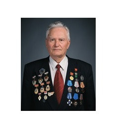 митько иван михайлович Донецк